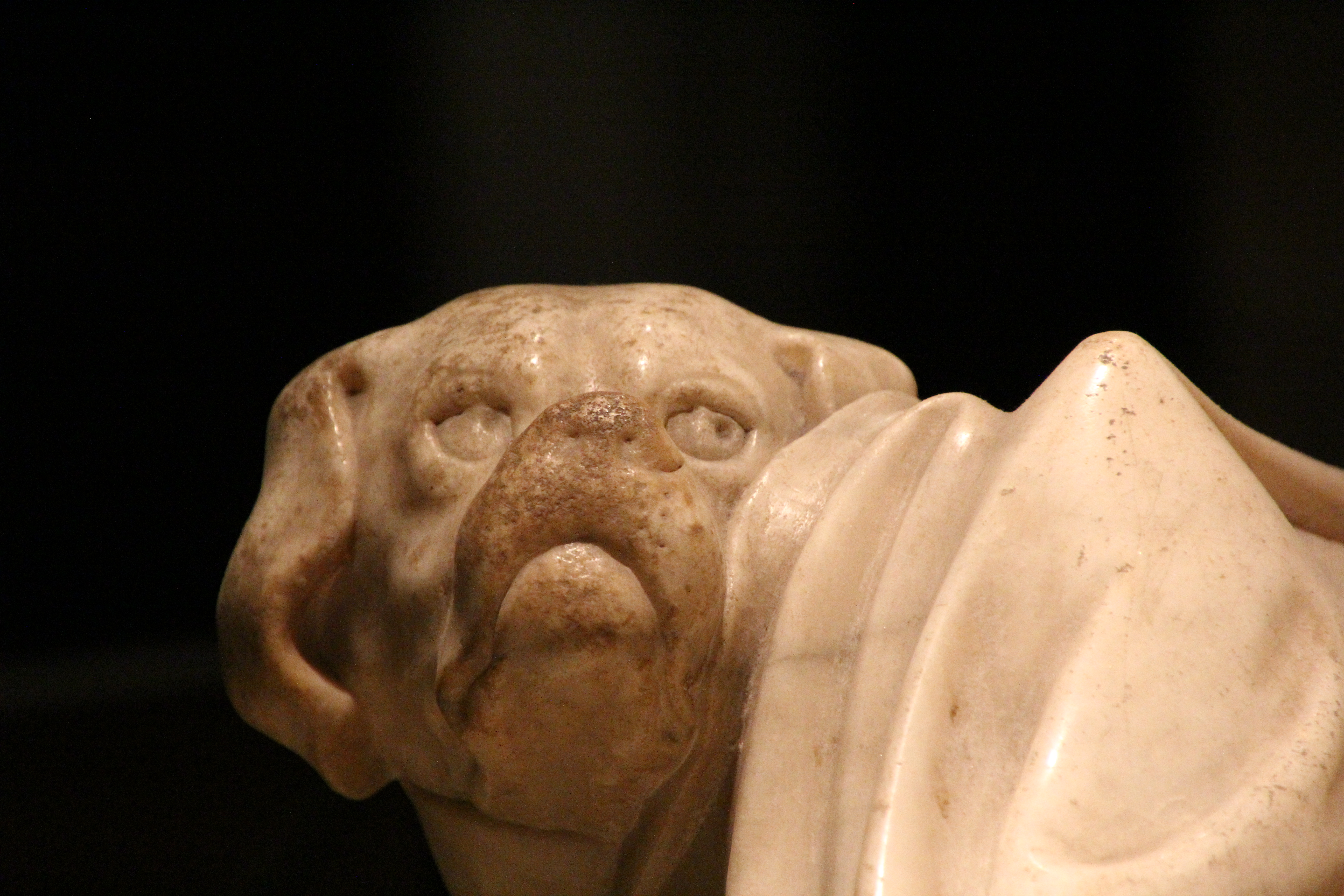 Lucca, cattedrale di San Martino